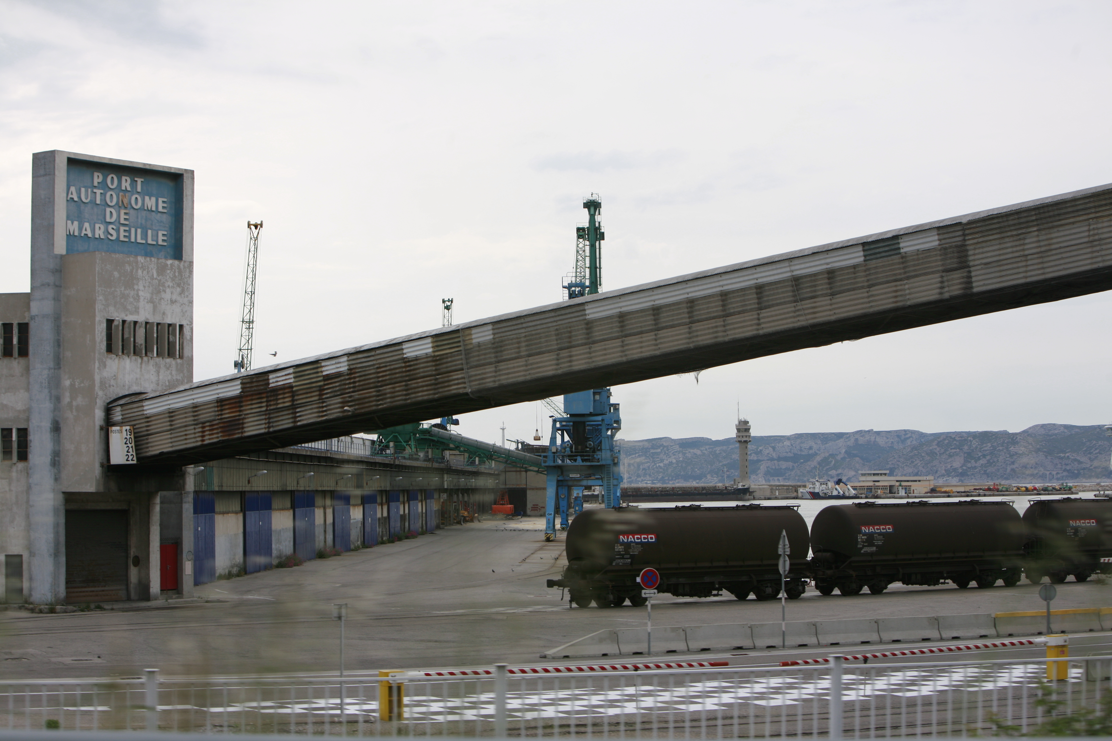 Marseille harbour